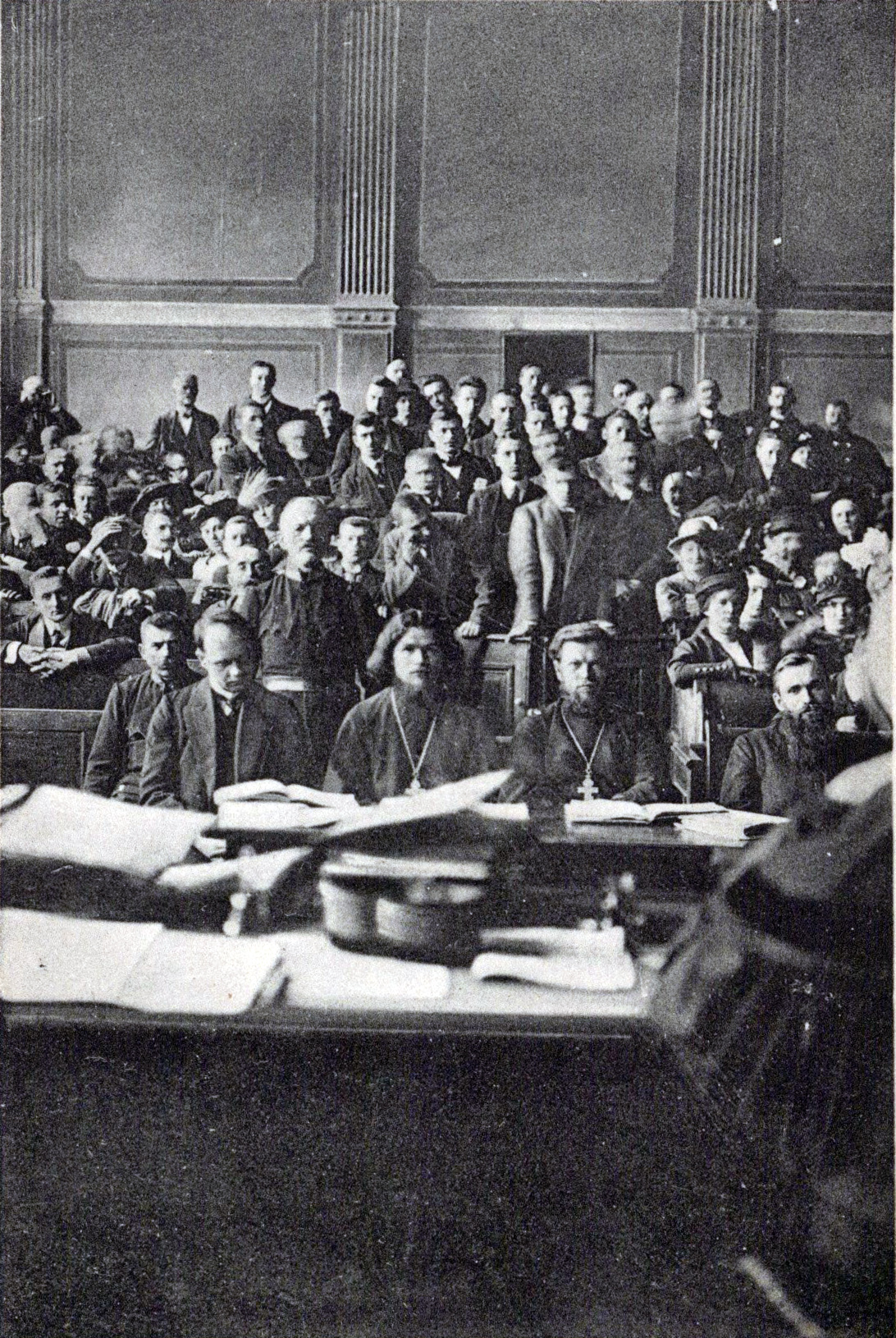 Скамья подсудимых и аудитория